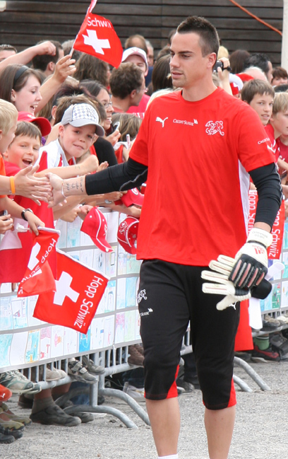 Diego Benaglio im Trainingslager der Schweizer Fussballnationalmannschaft vor der Euro 2008